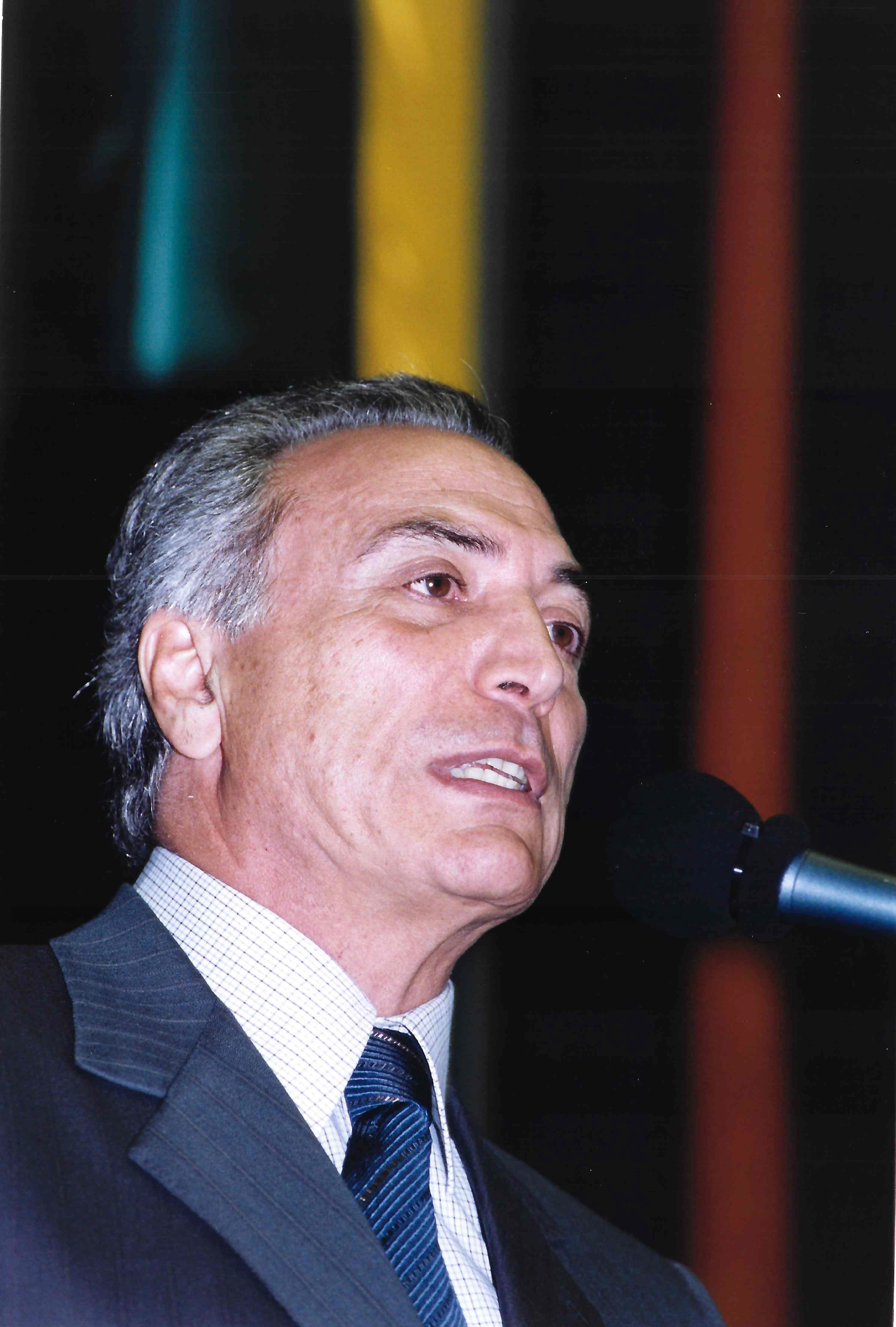 Foto de época de Michel Temer disponibilizado por sua assessoria. Data precisa não informada.